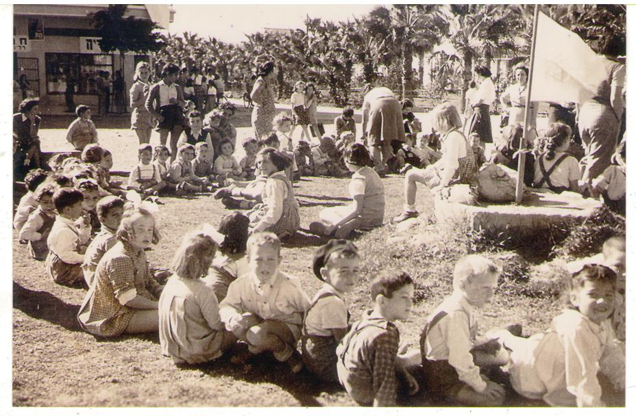 ילדים בעפולה במעגל שמחה למחרת יום כ"ט בנובמבר בו הכריז האו"מ על קבלת תכנית החלוקה